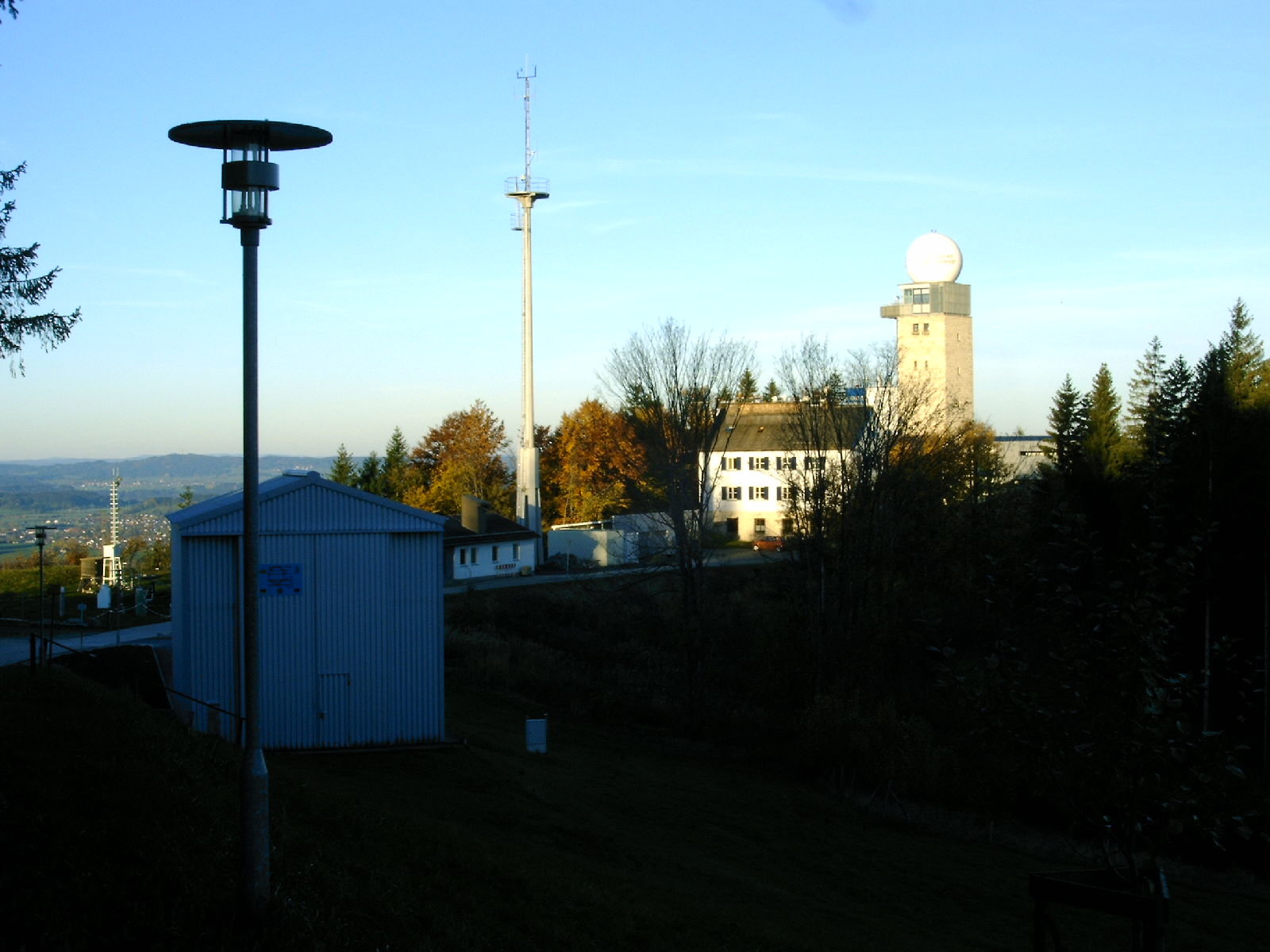 Hohenpeißenberg Observatorium 2.jpg